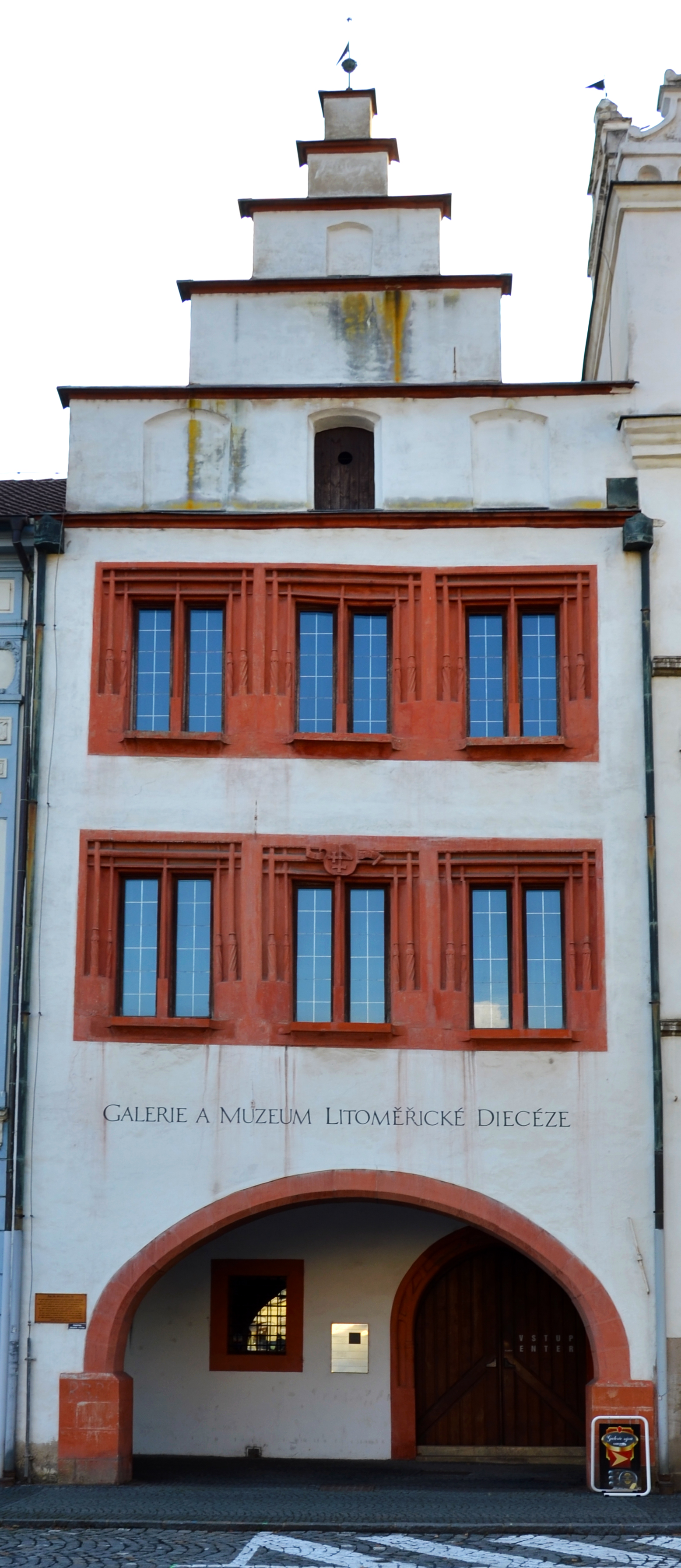 Galerie a muzeum litoměřické diecéze, Mírové náměstí 24/16, Litoměřice-Město.